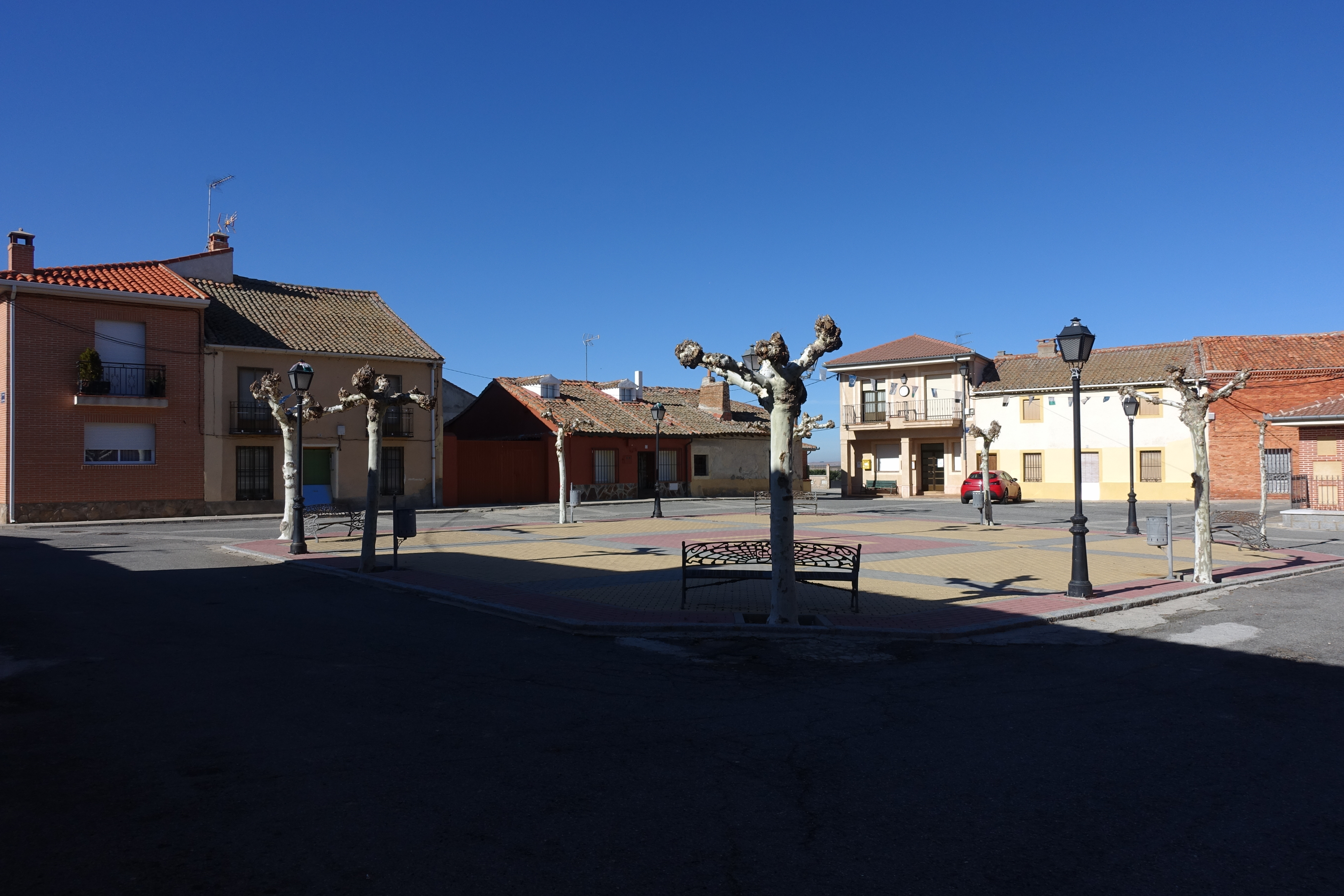 Plaza Mayor de Juarros de Riomoros (Segovia, España).